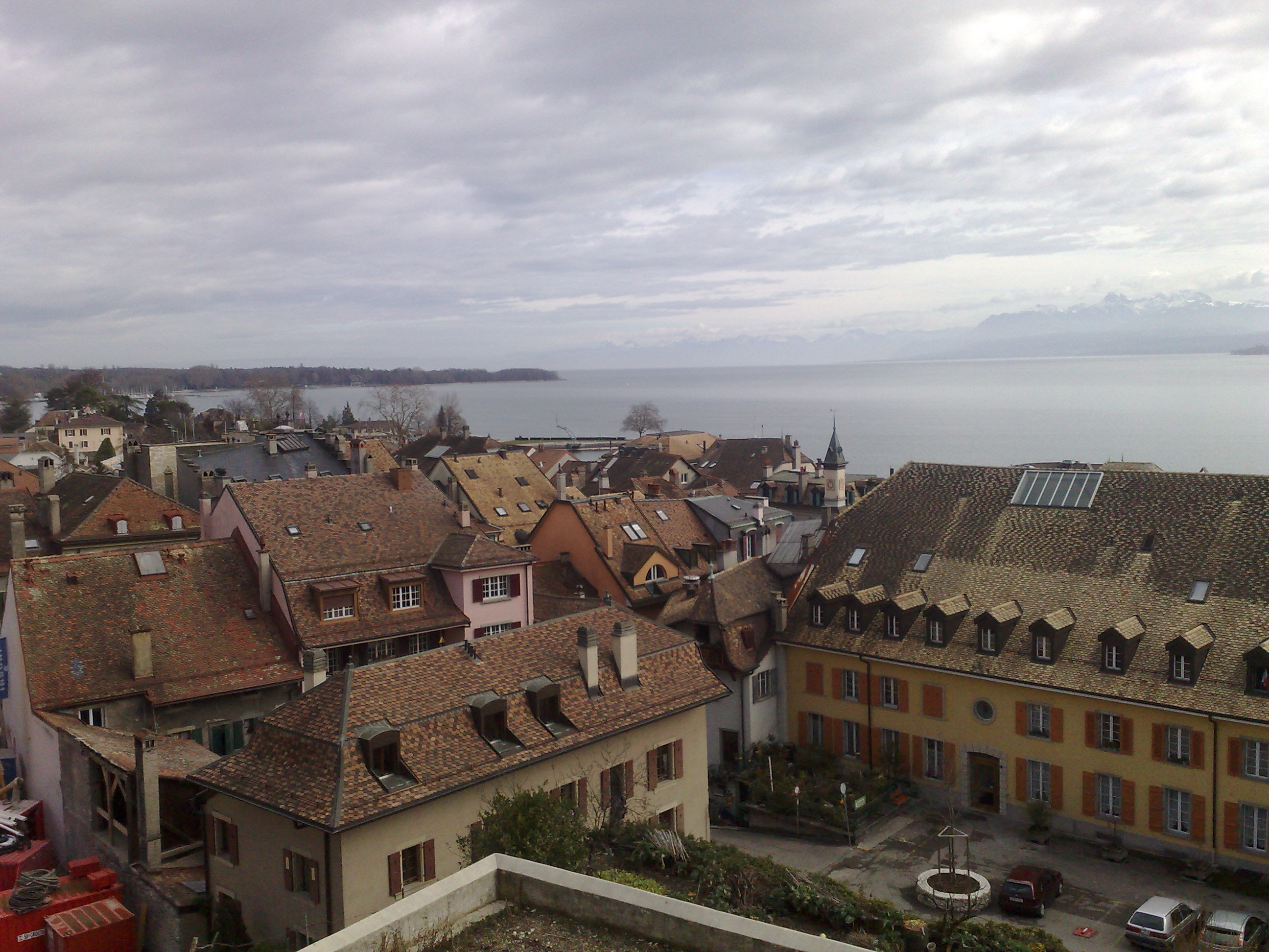 Vue du quartier de Rive et du lac Léman depuis le château de Nyon